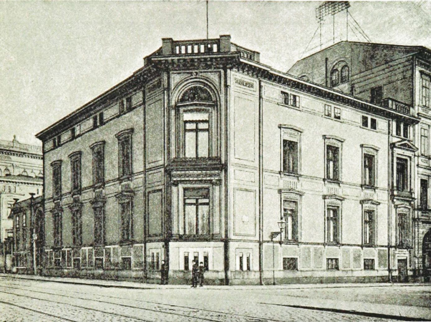 Die Villa des Bankiers Oskar Freiherr von Hoffmann am Leipziger Augustusplatz Ecke Roßplatz wurde 1859 von Architekt Christian August Eduard Pötzsch erbaut. 1929 wurde die Villa abgebrochen und mit dem Europa­haus überbaut.